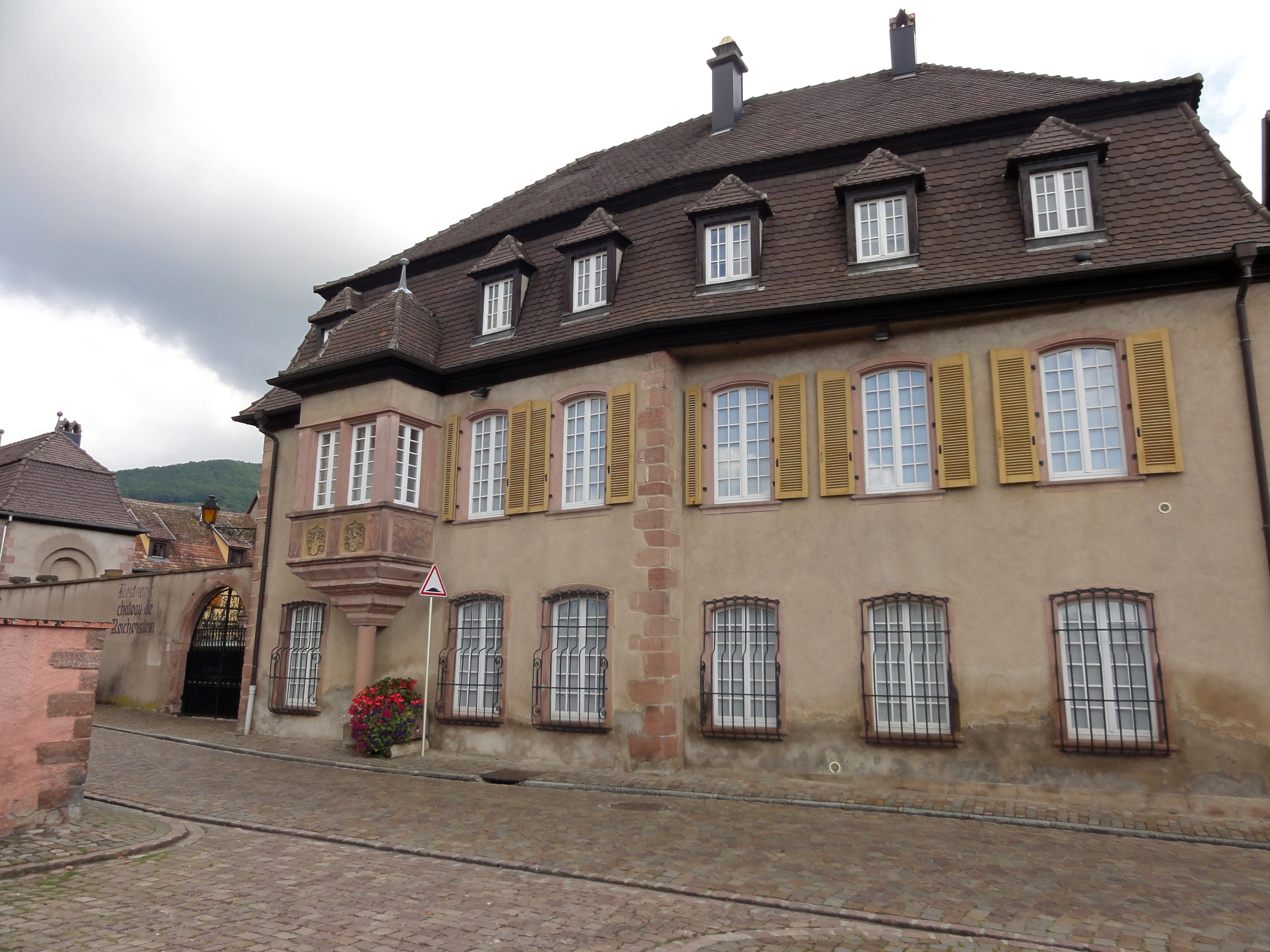 Alsace, Haut-Rhin, Kientzheim, Château de Reichenstein (XVe-XVIe-XVIIe), 88 Grand'Rue. It is indexed in the Base Mérimée, a database of architectural heritage maintained by the French Ministry of Culture, under the references PA00085498 and IA68004086 .